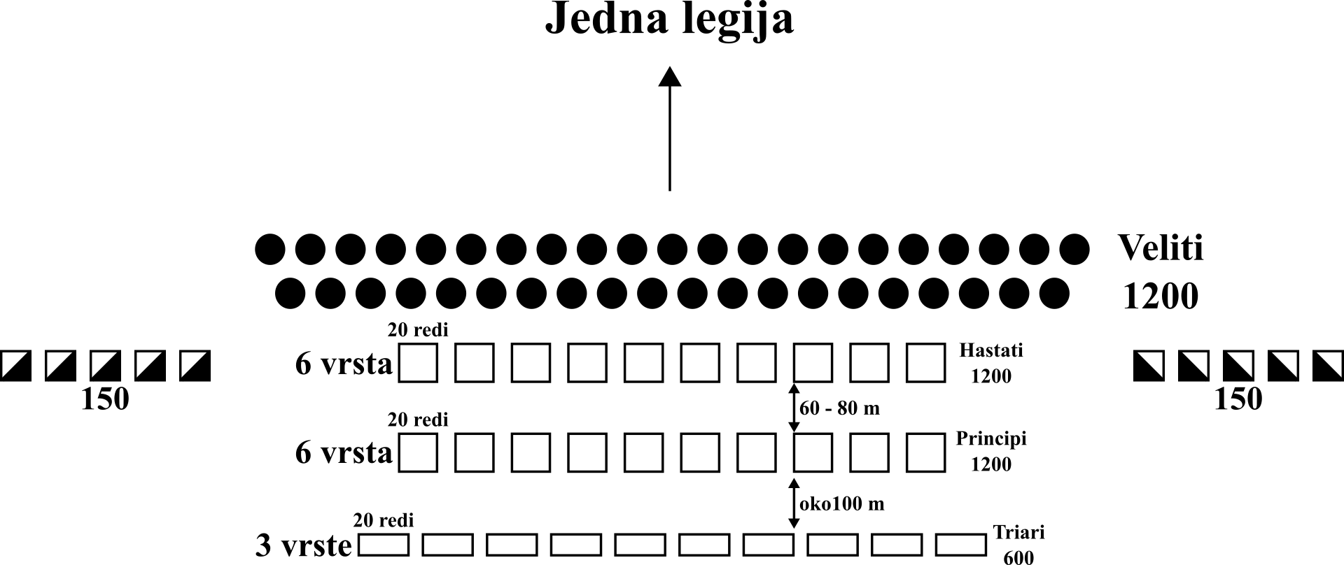 Grafički prikaz borbenog rasporeda manipularne falange.